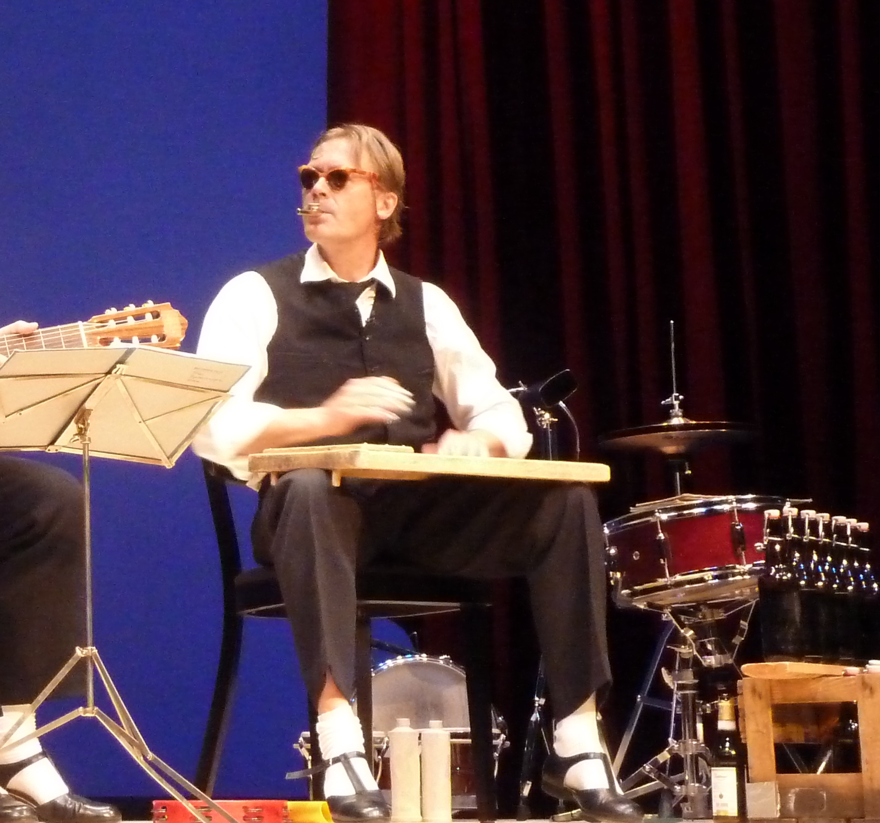 Jürgen Haase @ Zwinger Trio